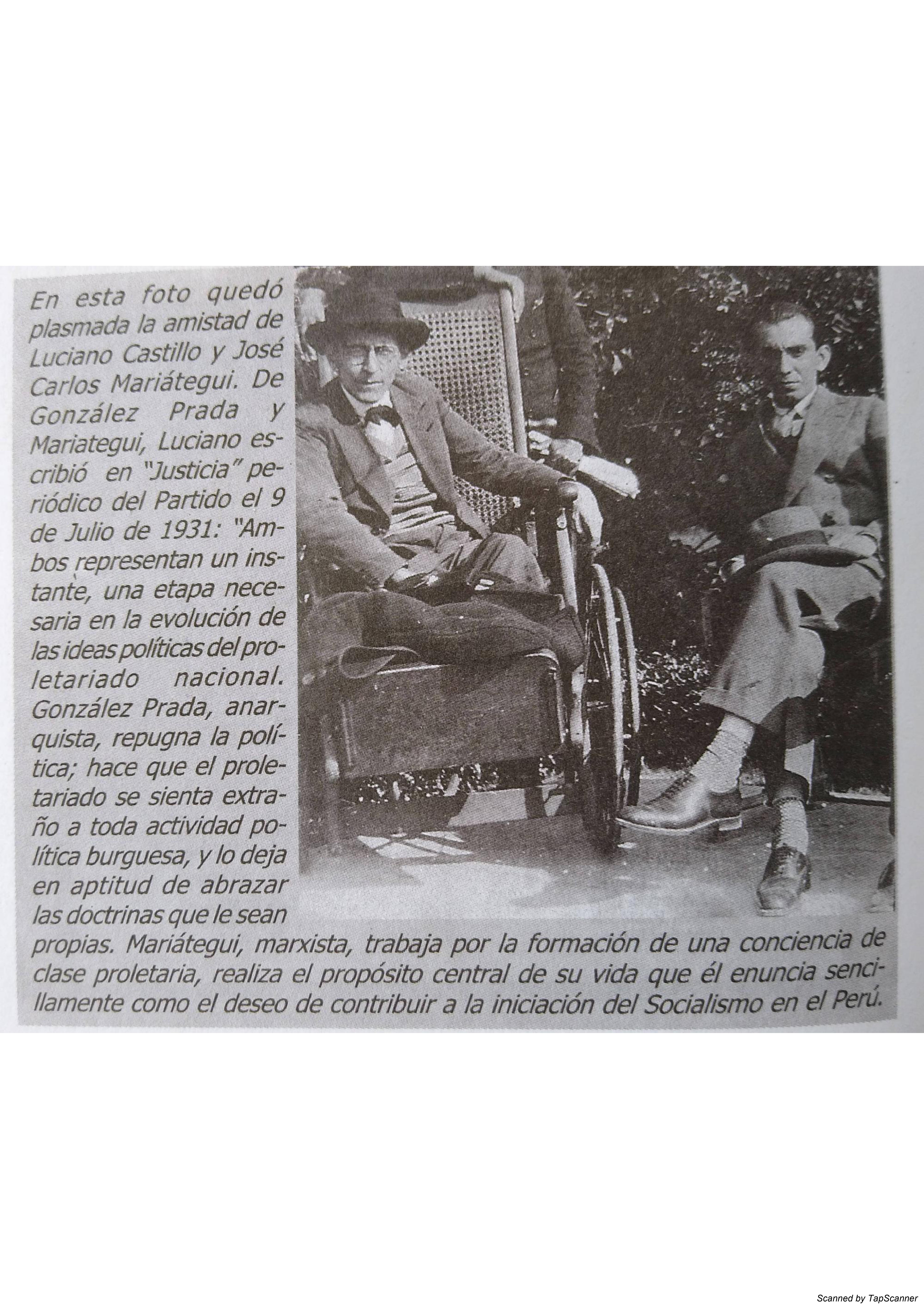 Foto del Recuerdo de J.C. Mariategui y Luciano Castillo Colonnna